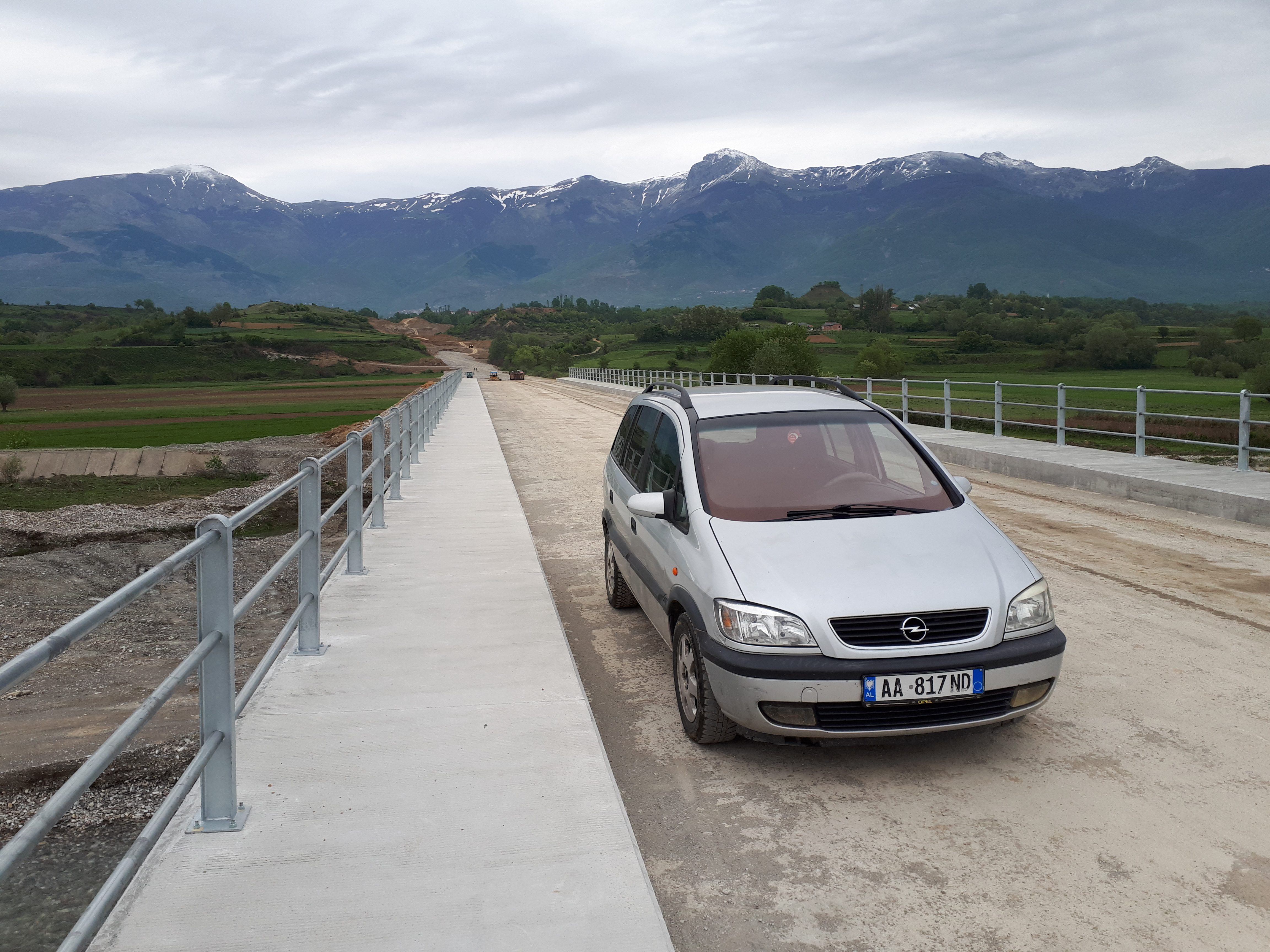 M. Gropa-Bize-Martanesh, Tirane, Mat, Buiqize